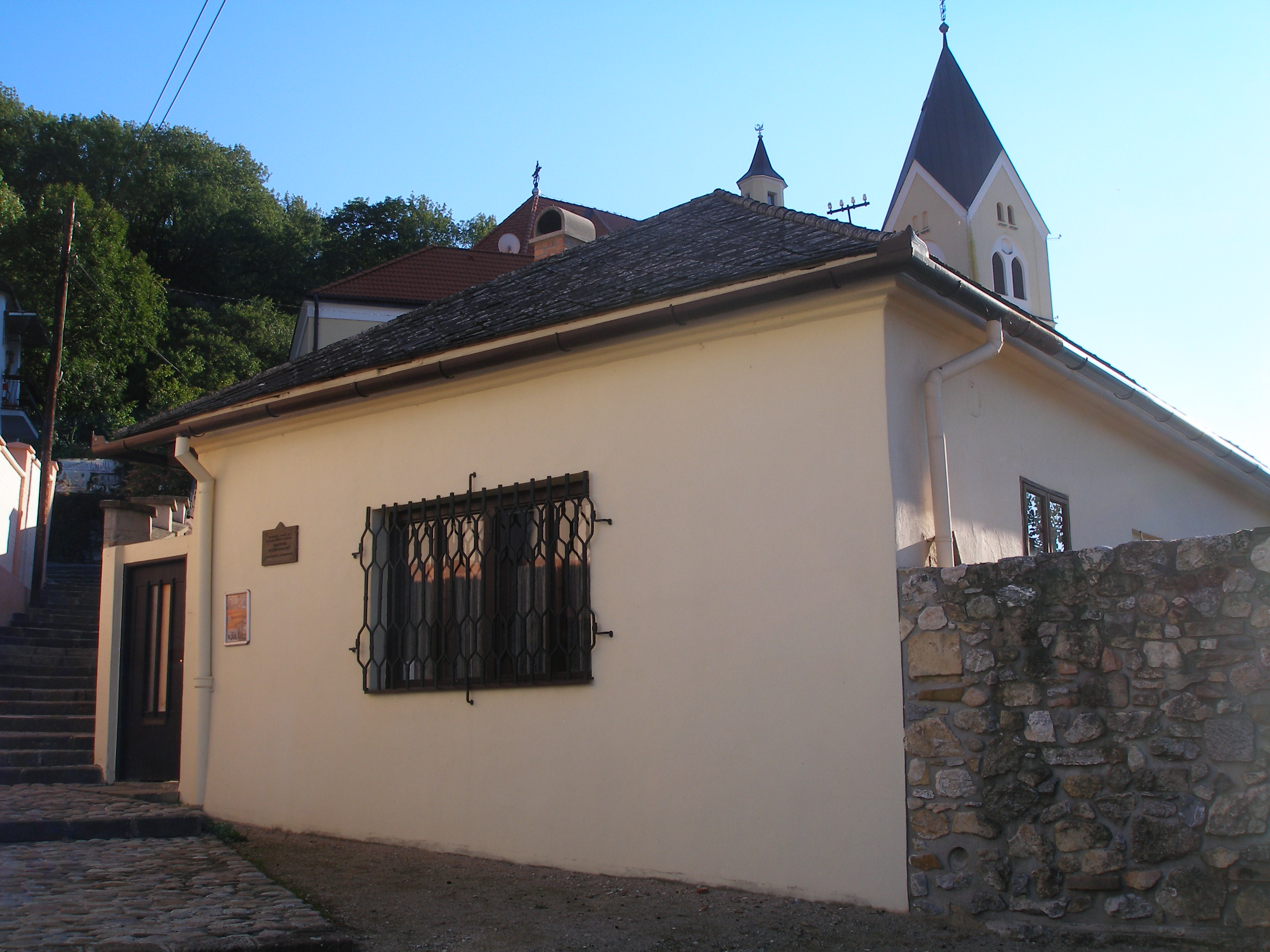 Rodný dům Vojtěcha Zamarovského v ulici Marka Aurelia v Trenčíně (pohled od východu).